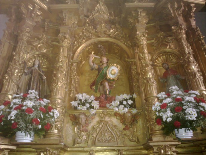 San Miguel Arcangel